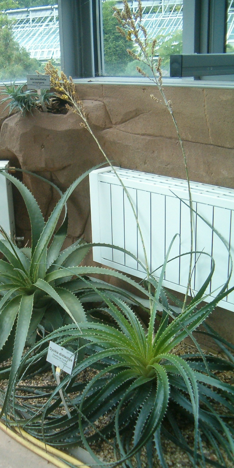 At Botanical Gardens Berlin-Dahlem Species Dyckia distachya